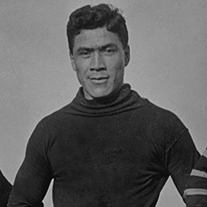 Albert Exendine